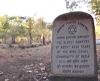 Photo en licence creative common, de zeevveez. Téléchargée sur , le 20 avril 2006. Importée sur fr.wikipedia par Christophe Cagé - liste de mes articles 17 septembre 2006 à 08:21 (CEST). Emplacement original de l'image : [1]. Commentaires de zeevveez : A Star of David on the sign at the entrance to Mavgav, the oldest cemetery of about 2000 years of the Bene-Israel community in India. Photo from the film "Legends of the Lost Tribes" courtesy of my good friend Aran Patinkin who directed the film [2]